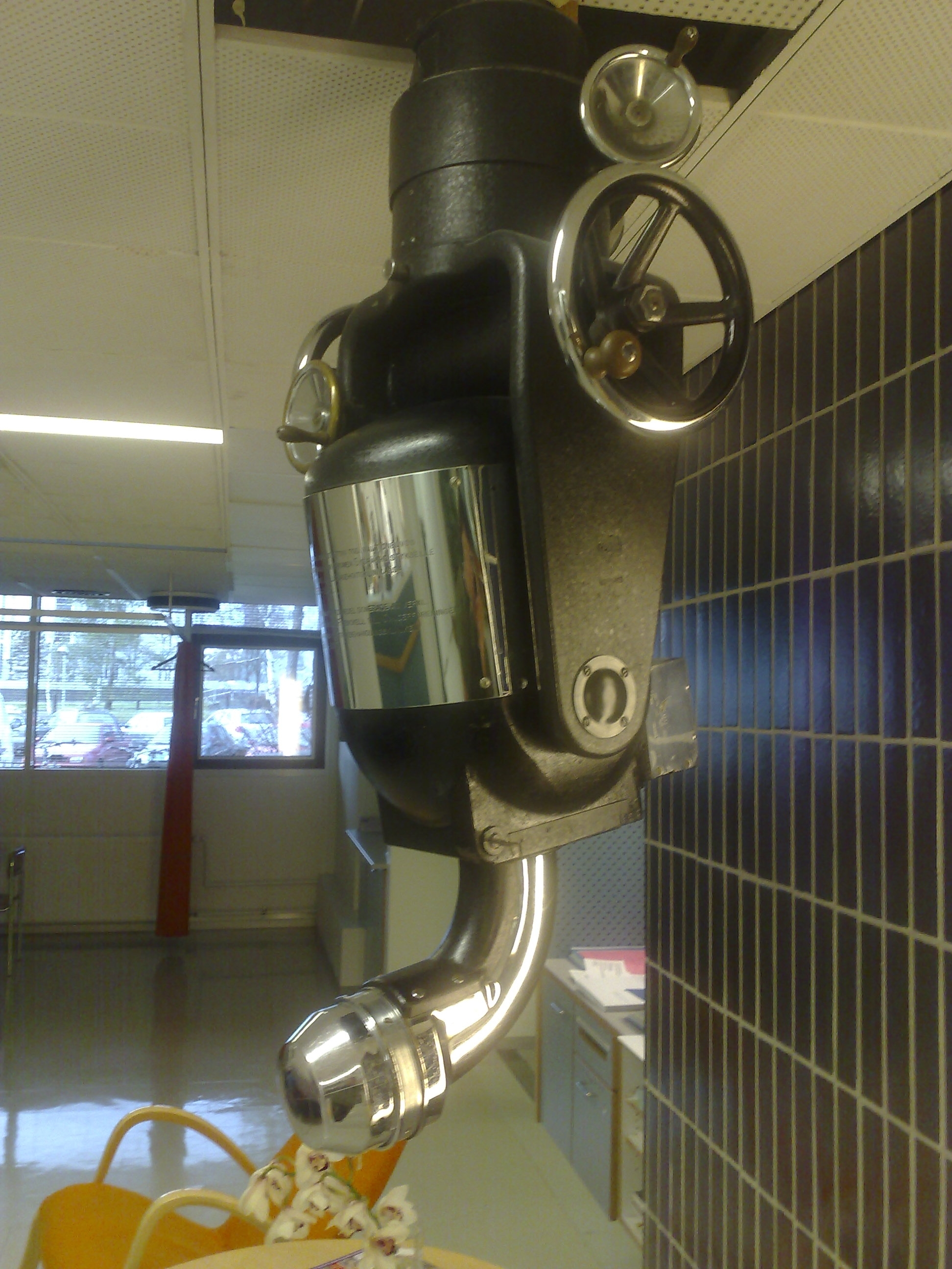 Suomen vanhin radiumkanuuna muistomerkkinä Meilahdessa HYKSin Syöpätautien klinikalla.